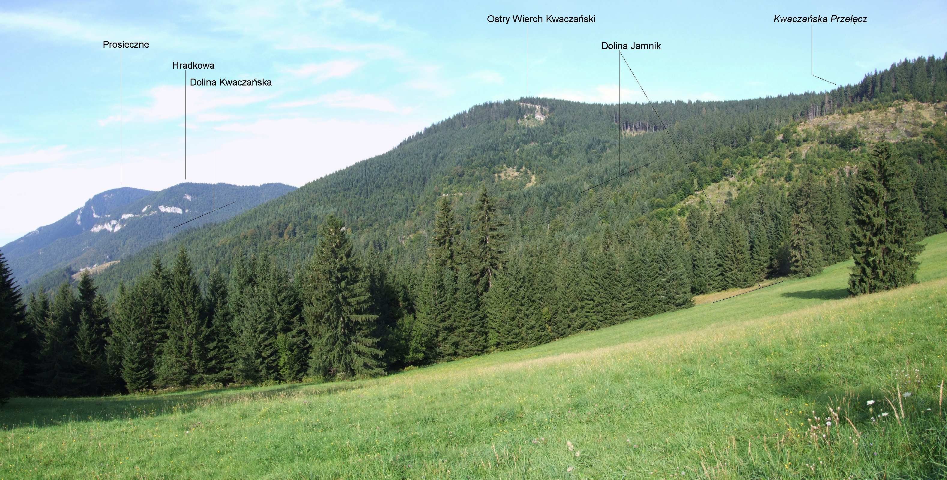 Widok z szosy przez Kwaczańską Przełęcz